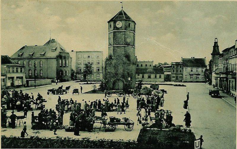 Żniński rynek na początku XX wieku